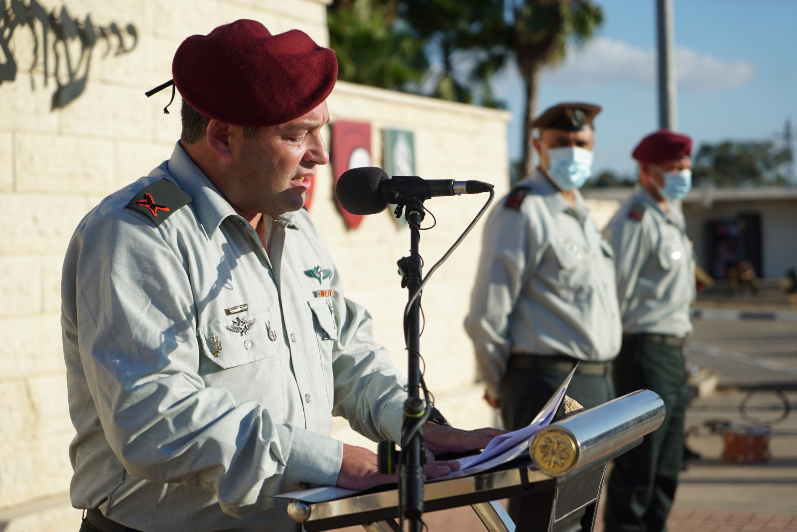 היום (ראשון) נכנס לתפקידו תא״ל עופר וינטר כמפקד עוצבת ״האש״. טקס החילופים נערך במחנה ״ליפקין״, במעמד מפקד פיקוד המרכז, אלוף תמיר ידעי, מפקדים, לוחמים, בני משפחה, ומוזמנים נוספים.